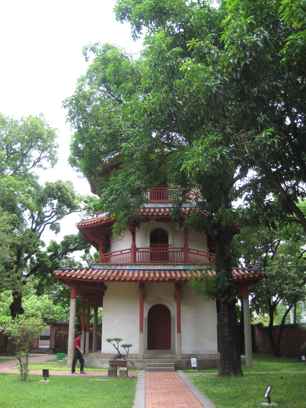 臺南孔廟文昌閣